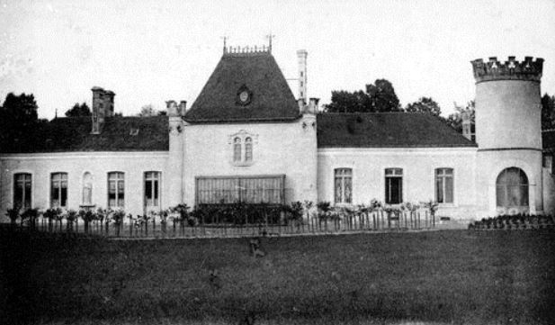 Ancienne carte postale représentant le château de Cloffy, à Nouans-les-Fontaines.